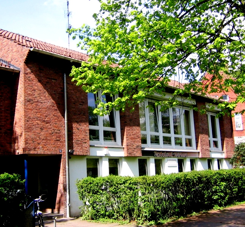 Pestalozzi-Stiftung Hamburg, Centre in Altona